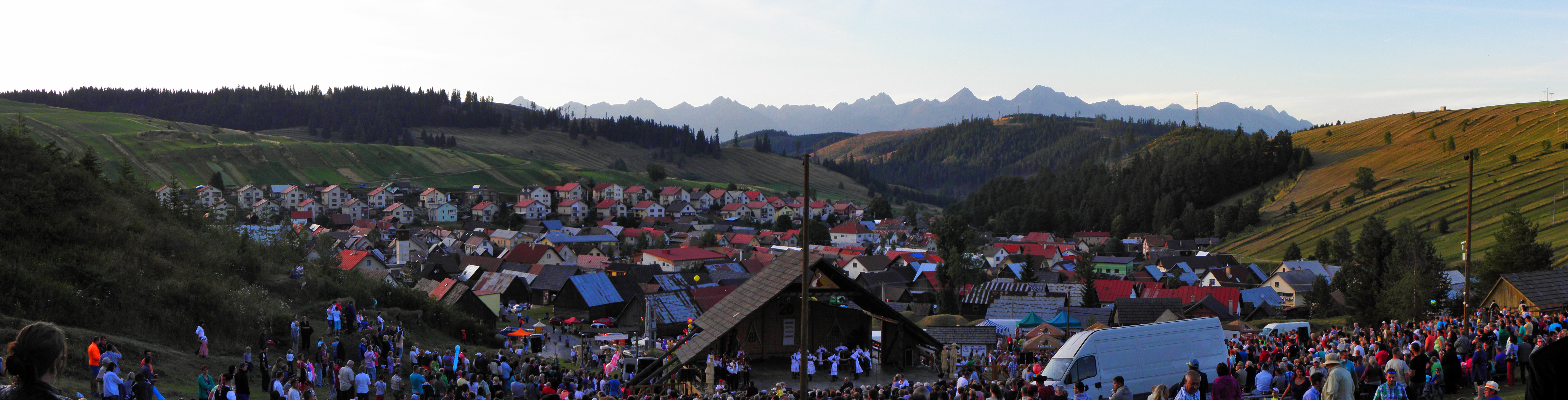 20. ročník folklórnych slávností Pod Kráľovou hoľou.